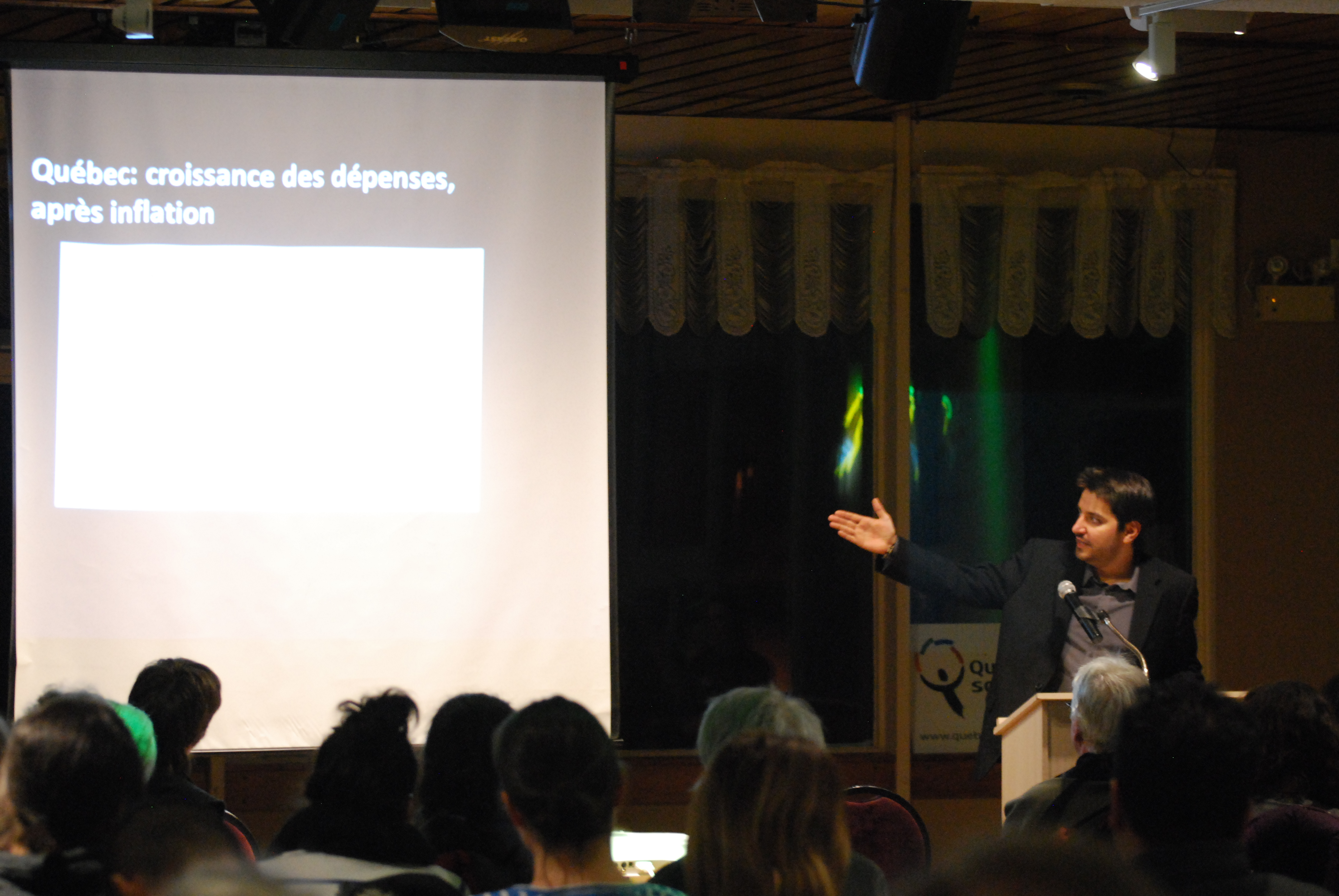 Philippe Hurteau de l'Institut de recherche et d'informations socio-économiques.